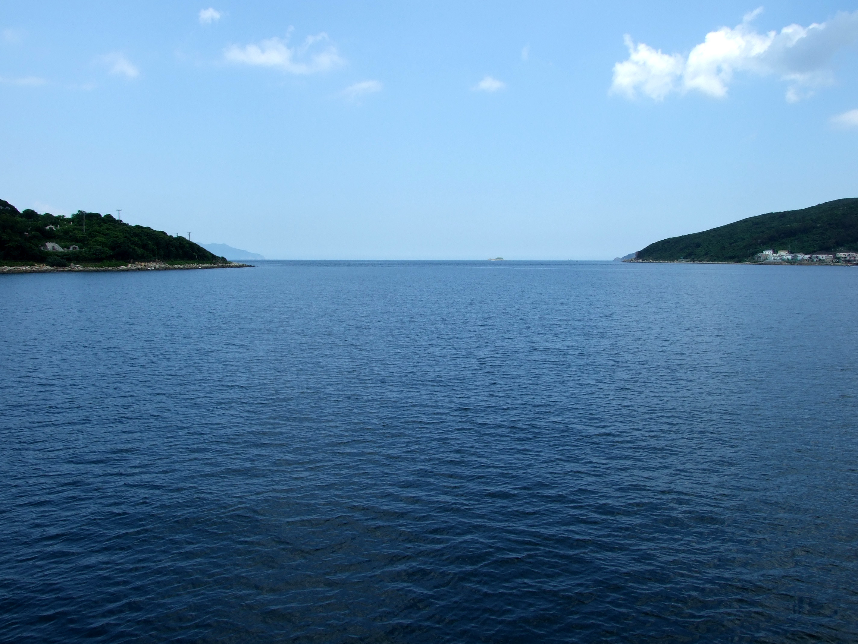 中文（香港）: 塔門口